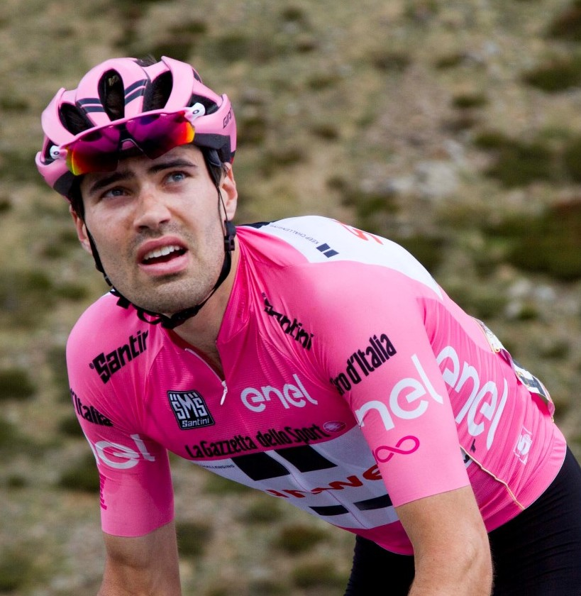 051 dumoulin